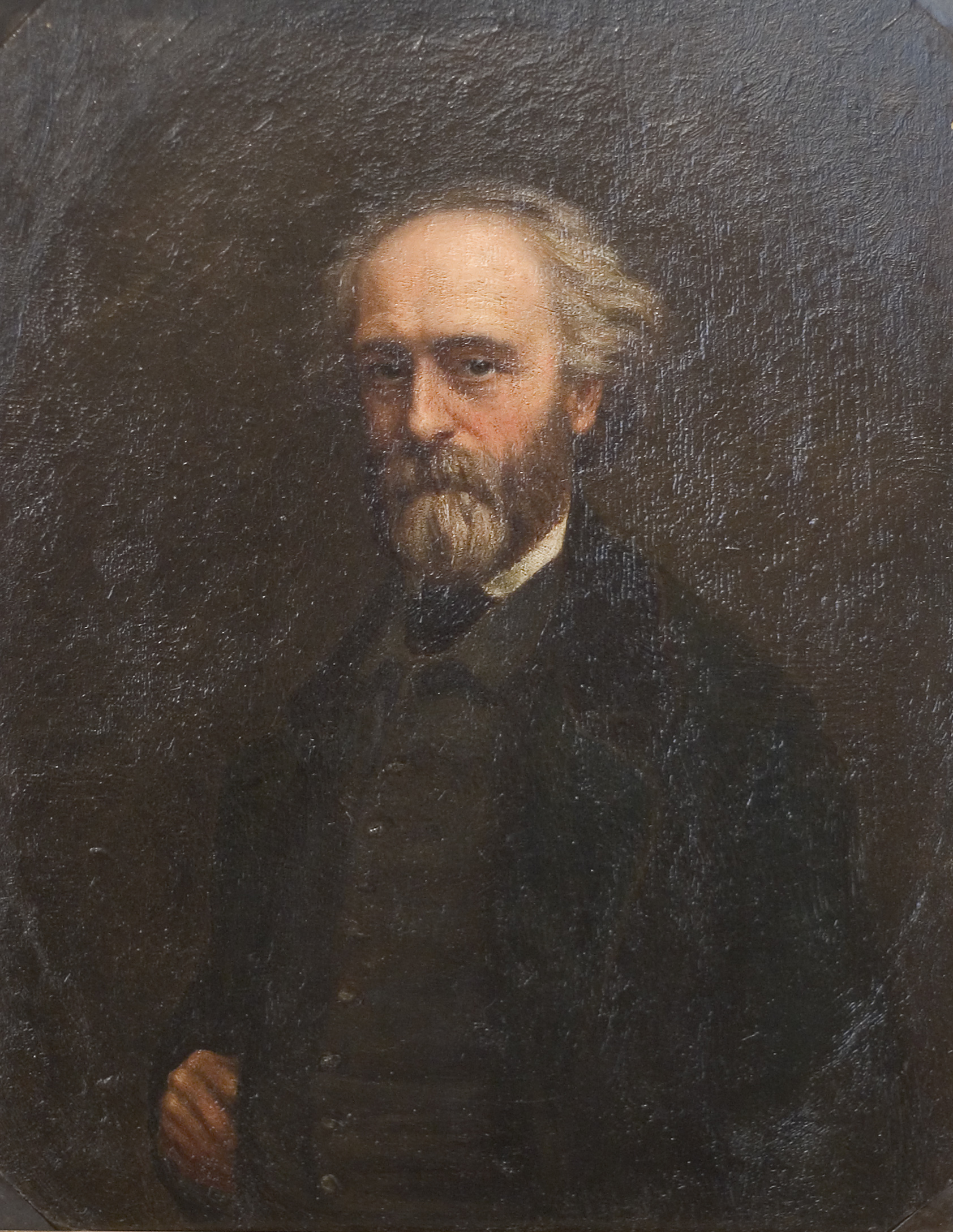 Autoportrait